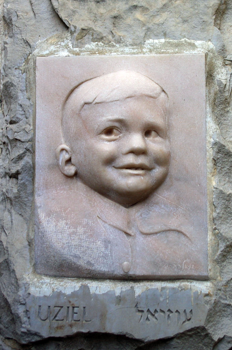 Relief Childrens Memorial